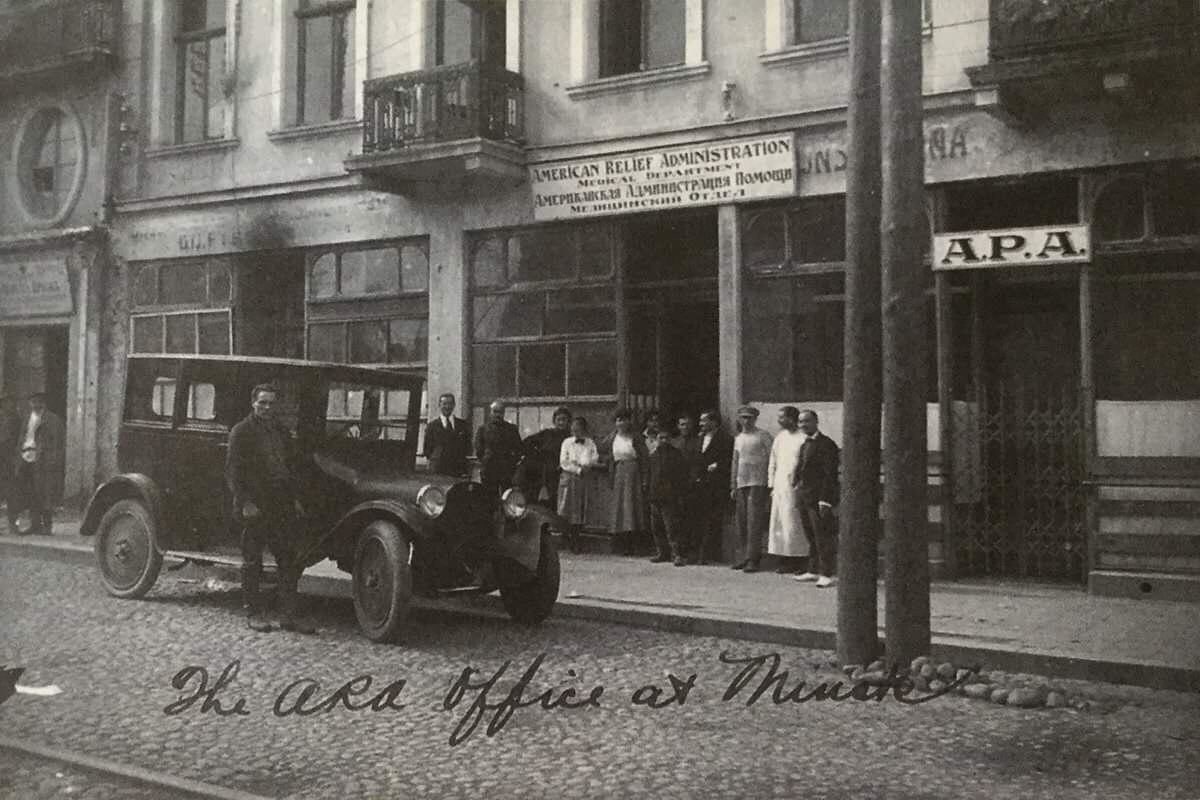 Беларуская (тарашкевіца): Менск (Miensk), вуліца Захараўская (vulica Zacharaŭskaja) каля скрыжаваньня з Лошыцкай (vulica Łošyckaja). Амэрыканская адміністрацыя дапамогі